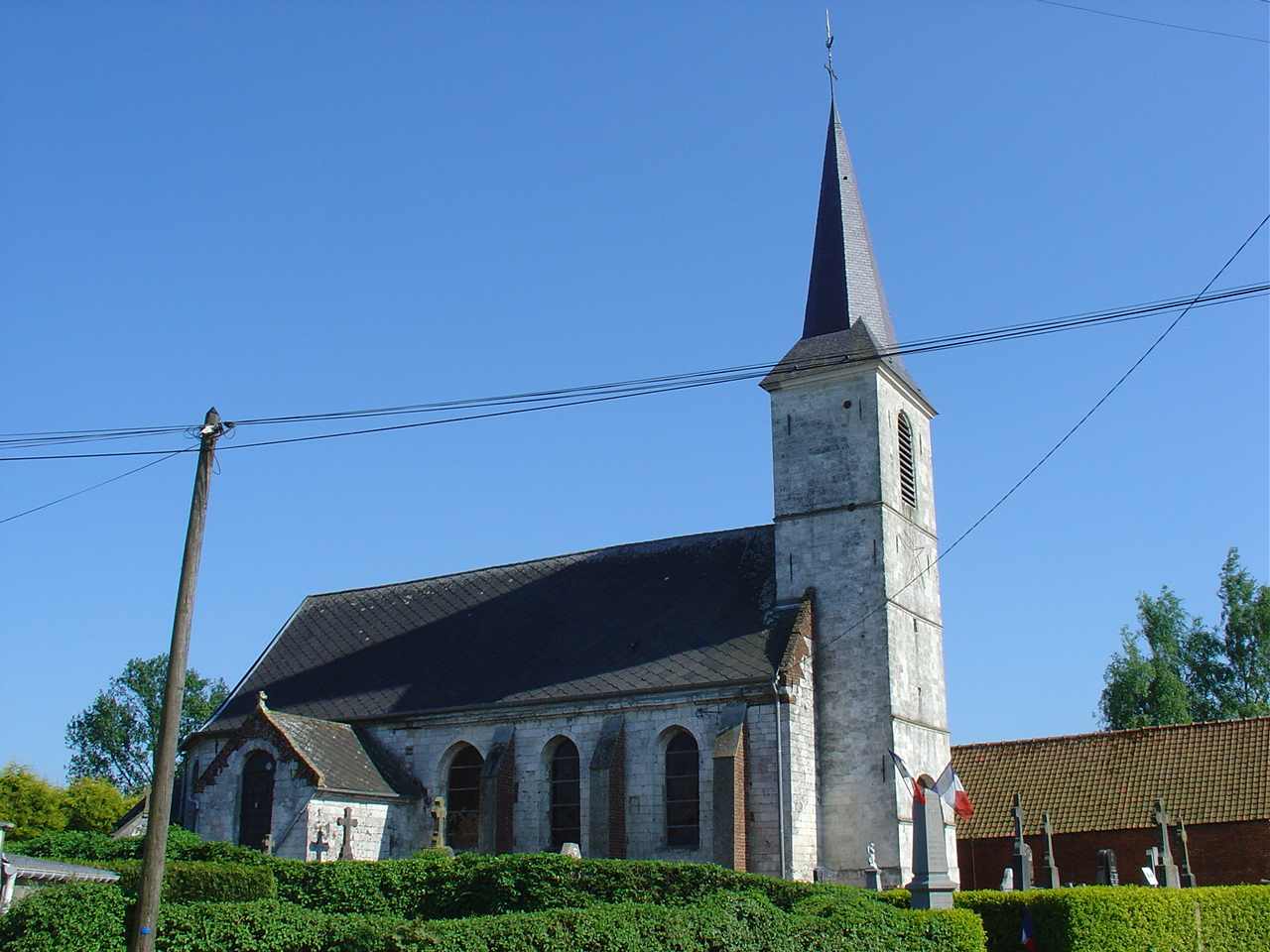 Église d'Héricourt